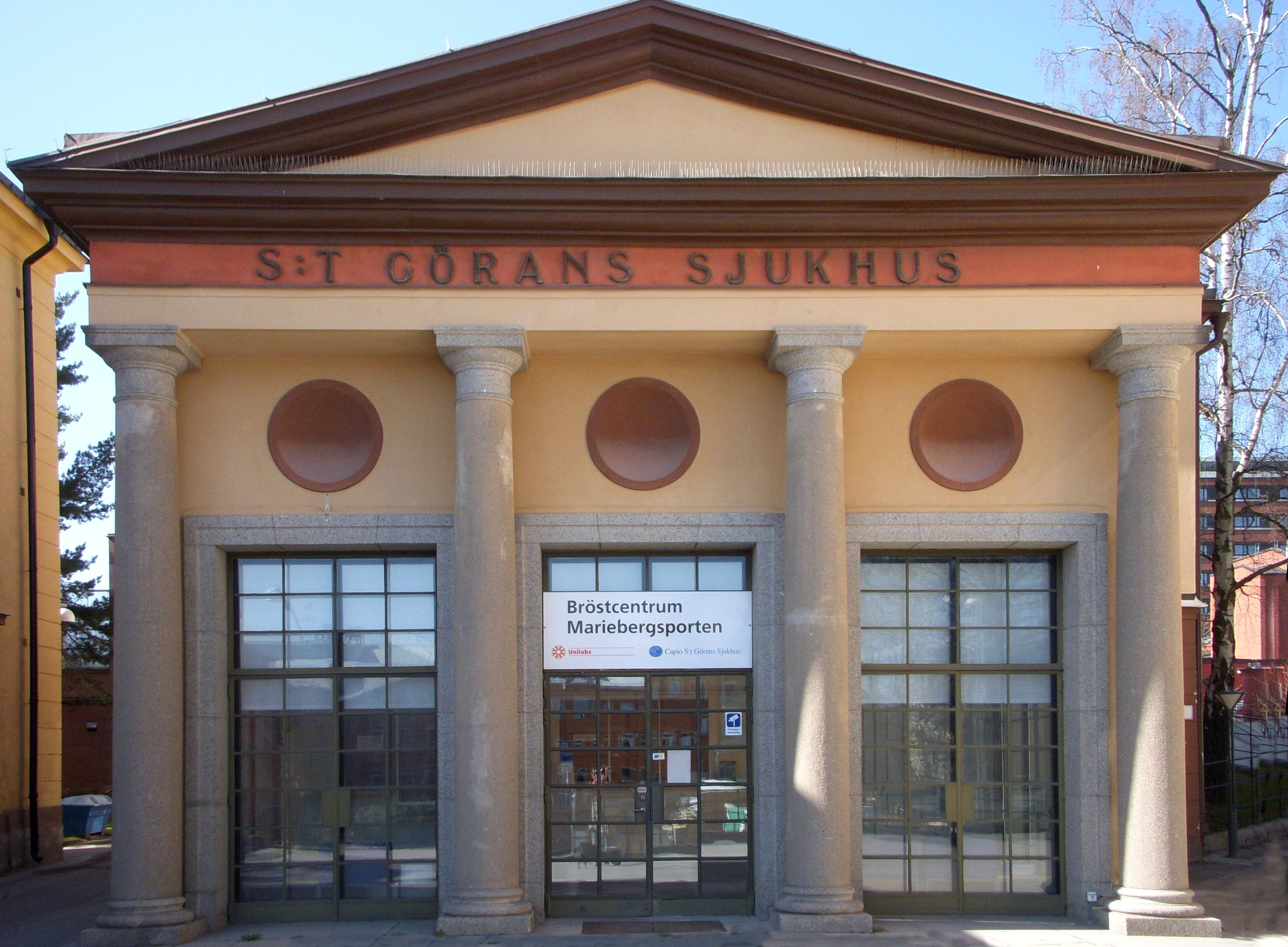 Sankt Görans sjukhus, ett av ursprungshusen. Arkitekt Karl Güettler